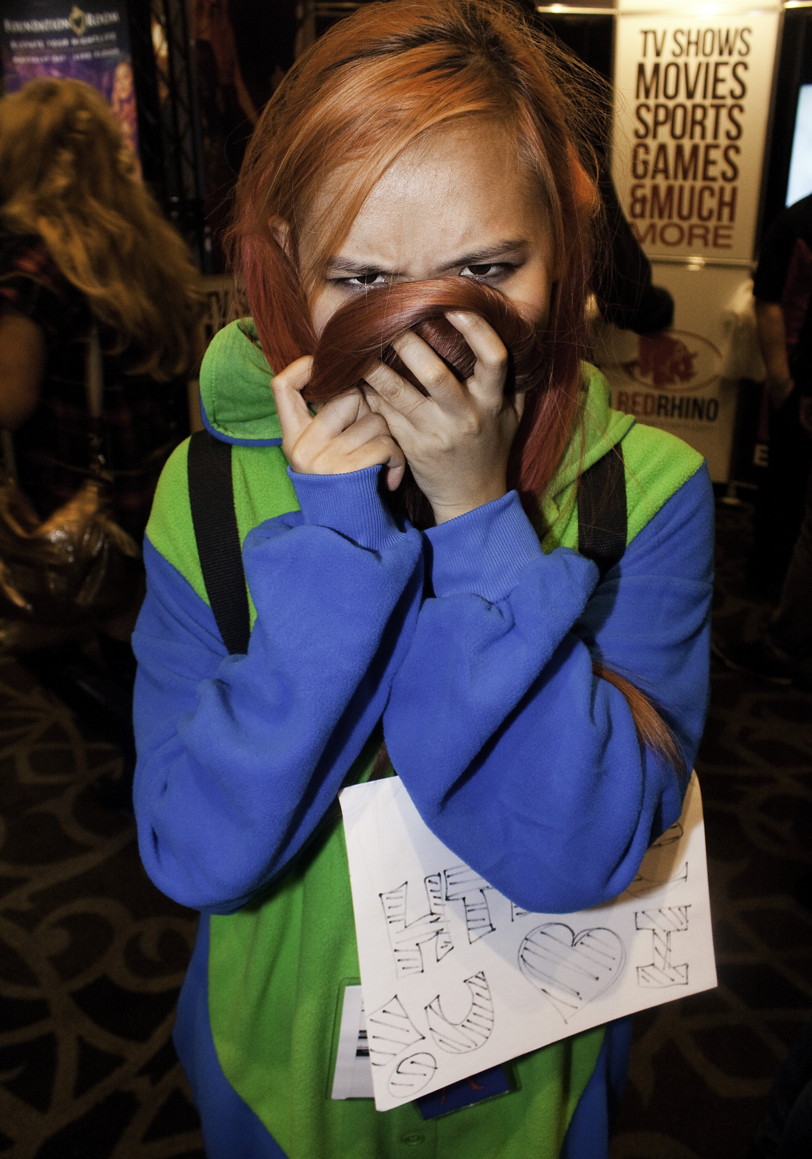 AEE16_0208bas